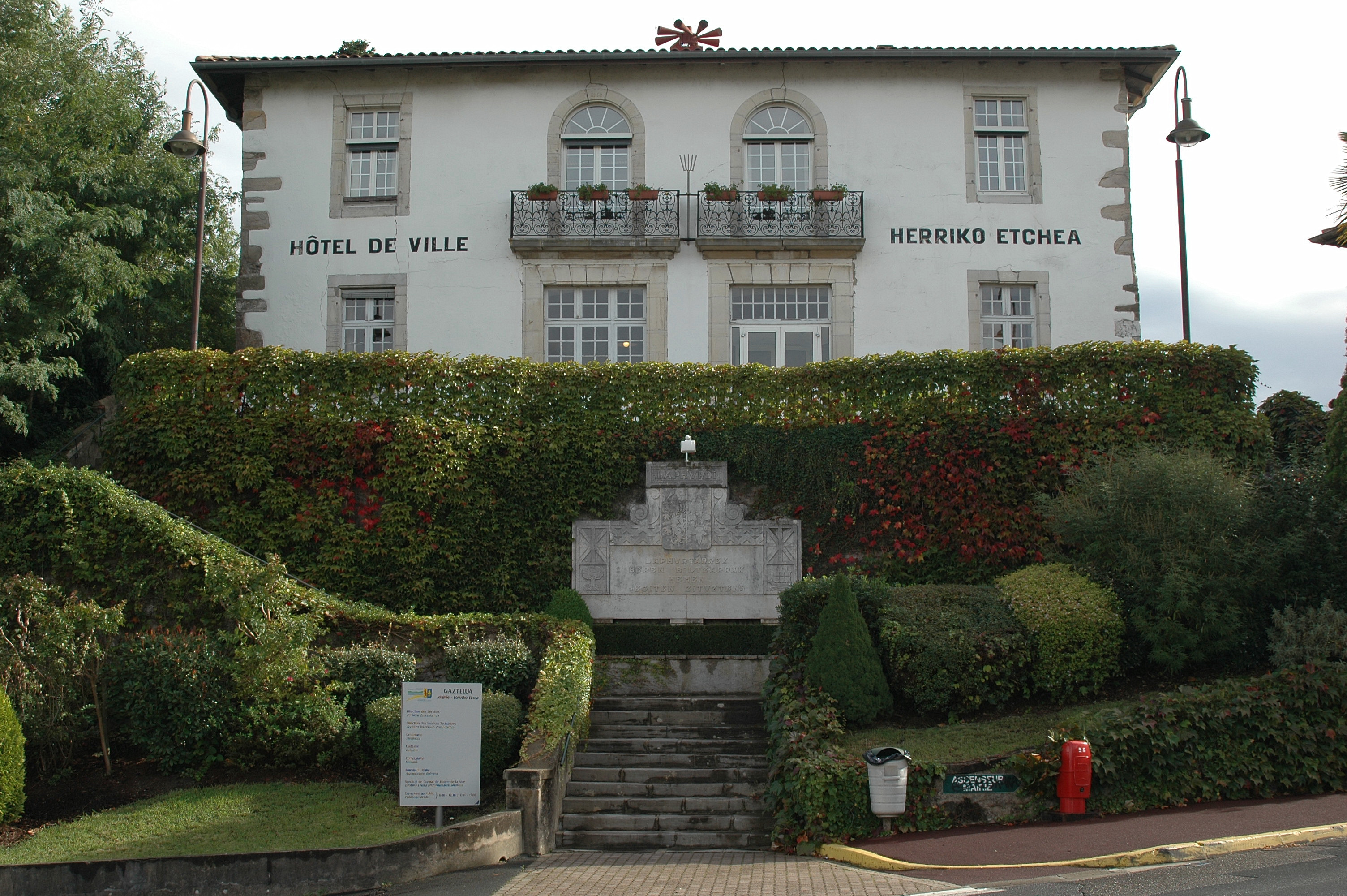 Ustaritz, Mairie et ancienne demeure des vicomtes du Labourd et des ducs d'Aquitaine. Photo prise le 20/10/06 par Harrieta171